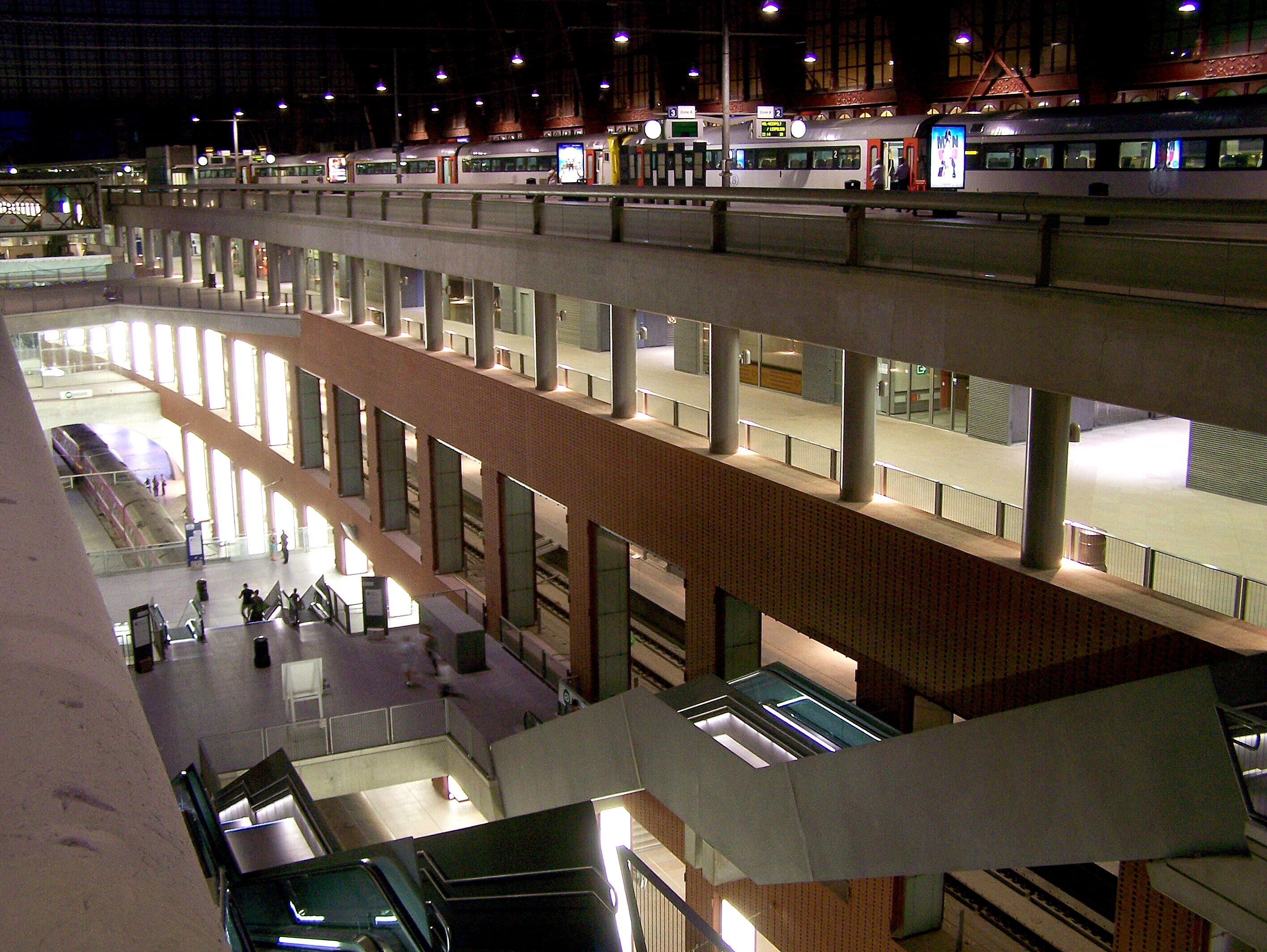 Antwerpen Centraal Atrium